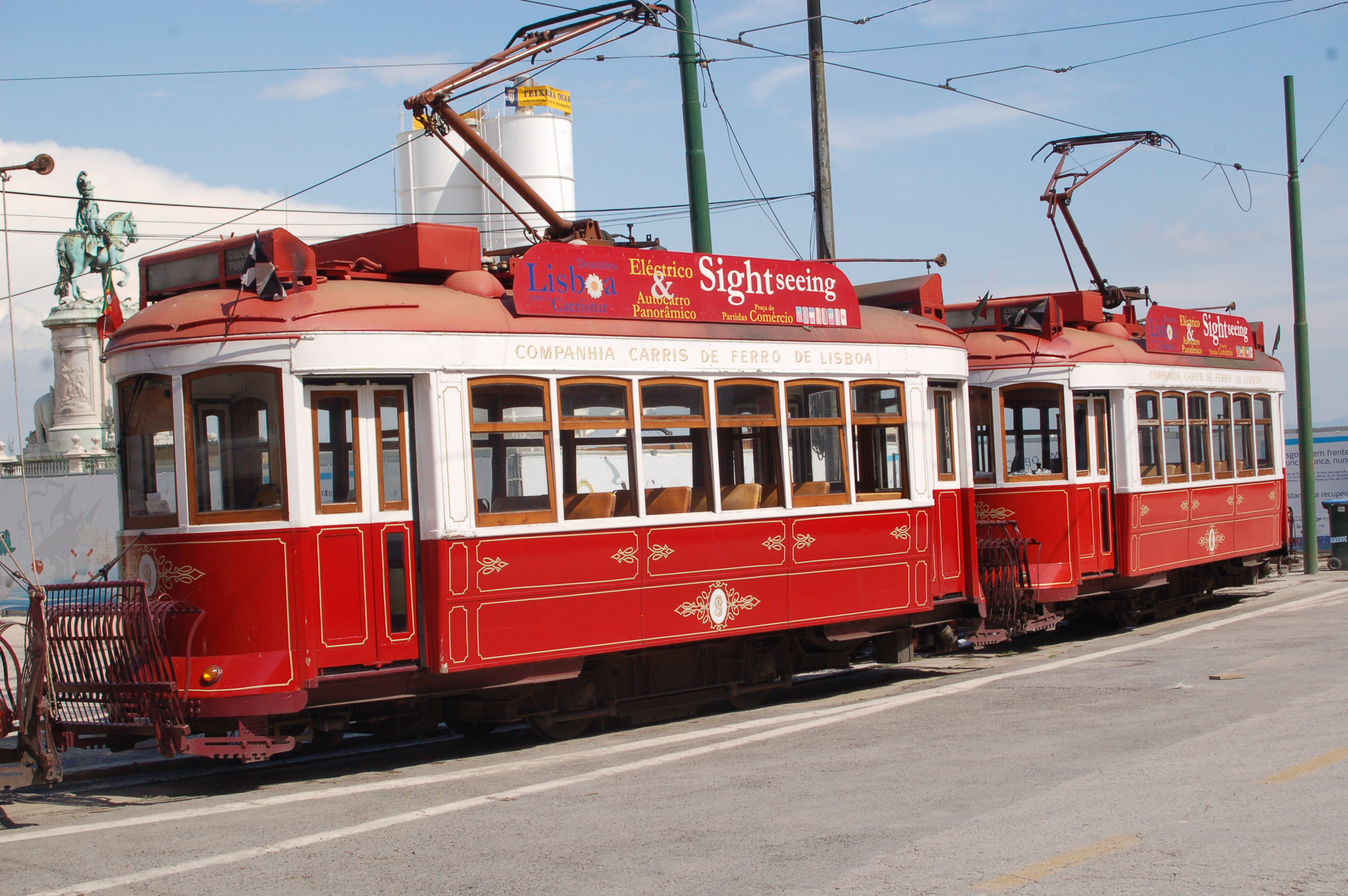 Für touristische Stadtrundfahrten eingesetzter Triebwagen der Carris in Lissabon in roter Lackierung - Baujahr ca 1930 Noch ältere Strassenbahnen fahren auch heute noch im Linienverkehr durch die engen Gassen der Innenstadt.